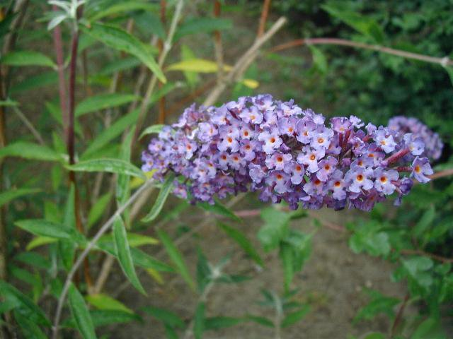 Buddleja davidii